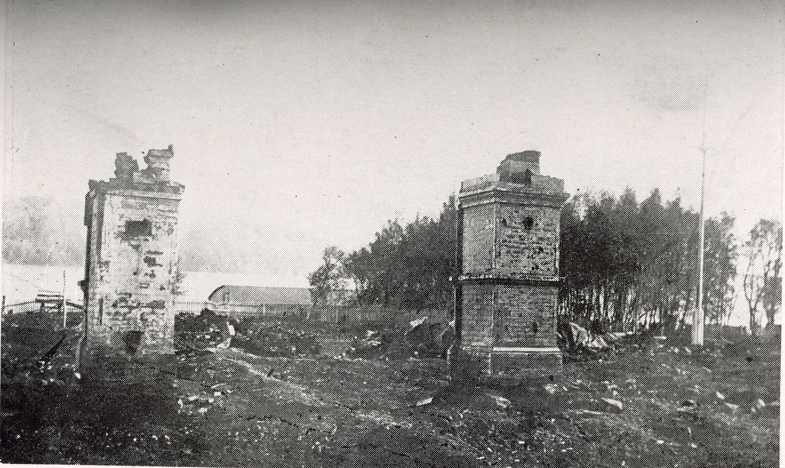 尼港日本領事館の廃墟（尼港事件）